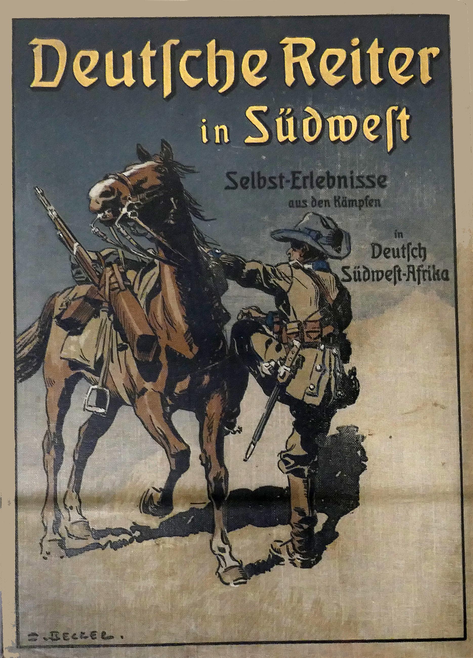 Friedrich Freiherr von Dincklage-Campe (1839-1918), Deutsche Reiter in Südwest. Selbsterlebnisse aus den Kämpfen in Deutsch-Südwestafrika (1909). Museum im Ritterhaus (Offenburg). Ein Fenster zur Welt. Die kolonialzeitliche Sammlung.